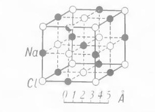 NaCl քարաղի բյուրեղային ցանցը